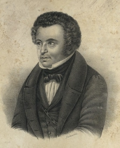 ליתוגרפיה ובה ציור דיוקנו של גוטהולד סלומון: הדפס אבן, 18X26.5 ס"מ. תחת הדיוקן, נדפס העתק מדברים שכתב סלומון בחודש מארס 1836. על הדפס זה, אשר הופק בגרמניה, לא מצויינים פרטים כלשהם באשר לזמן הפקתו. גוטהולד סלומון, 1784-1862. מטיף ורב רפורמי בגרמניה; מתרגם התנ"ך והברית החדשה לגרמנית